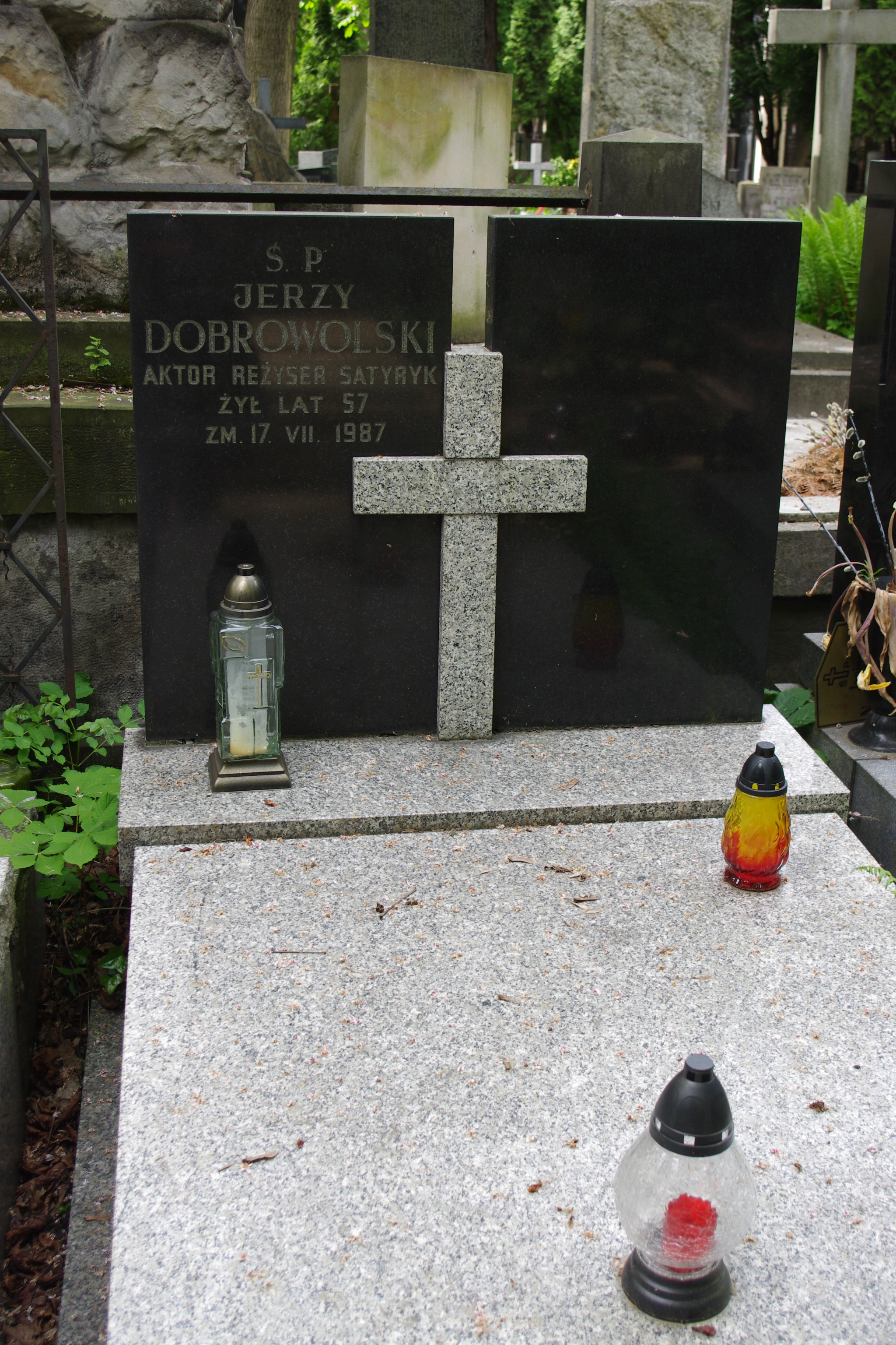 Grób satyryka i aktora Jerzego Dobrowolskiego na Starych Powązkach w Warszawie.